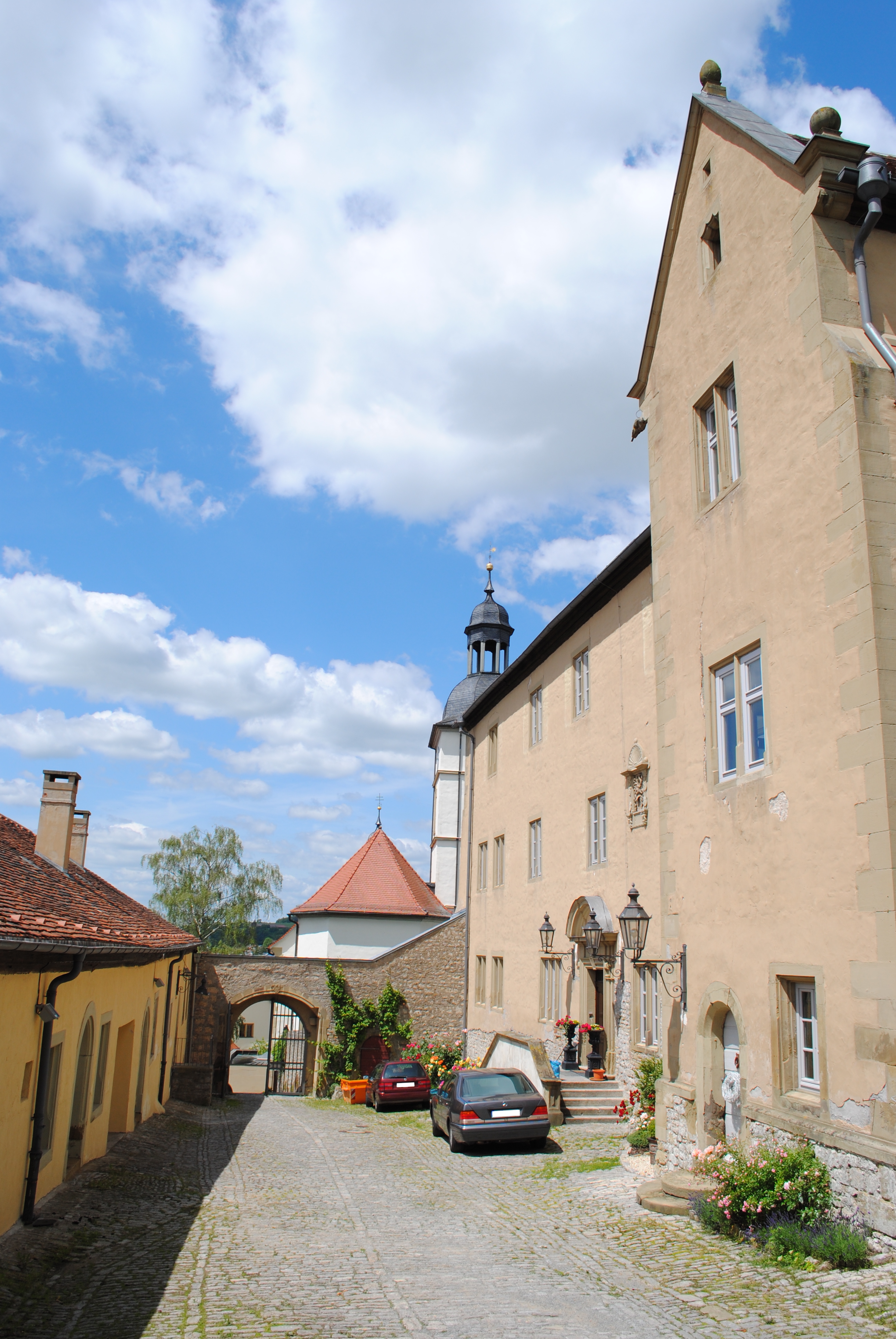 Innenhof der Burg Arnstein (Main-Spessart). Das Hauptgebäude befindet sich auf der rechten Seite, das Nebengebäude auf der linken.